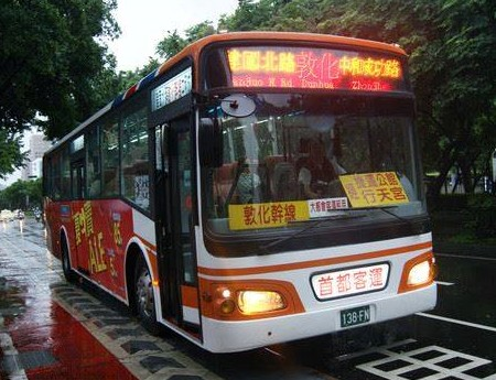 中文（台灣）: 首都客運2008年日野RK8JRSA大客車138-FN，大都會客運租用行駛臺北市聯營公車敦化幹線。庫存資料照片調出，畫質較差，敬請見諒。